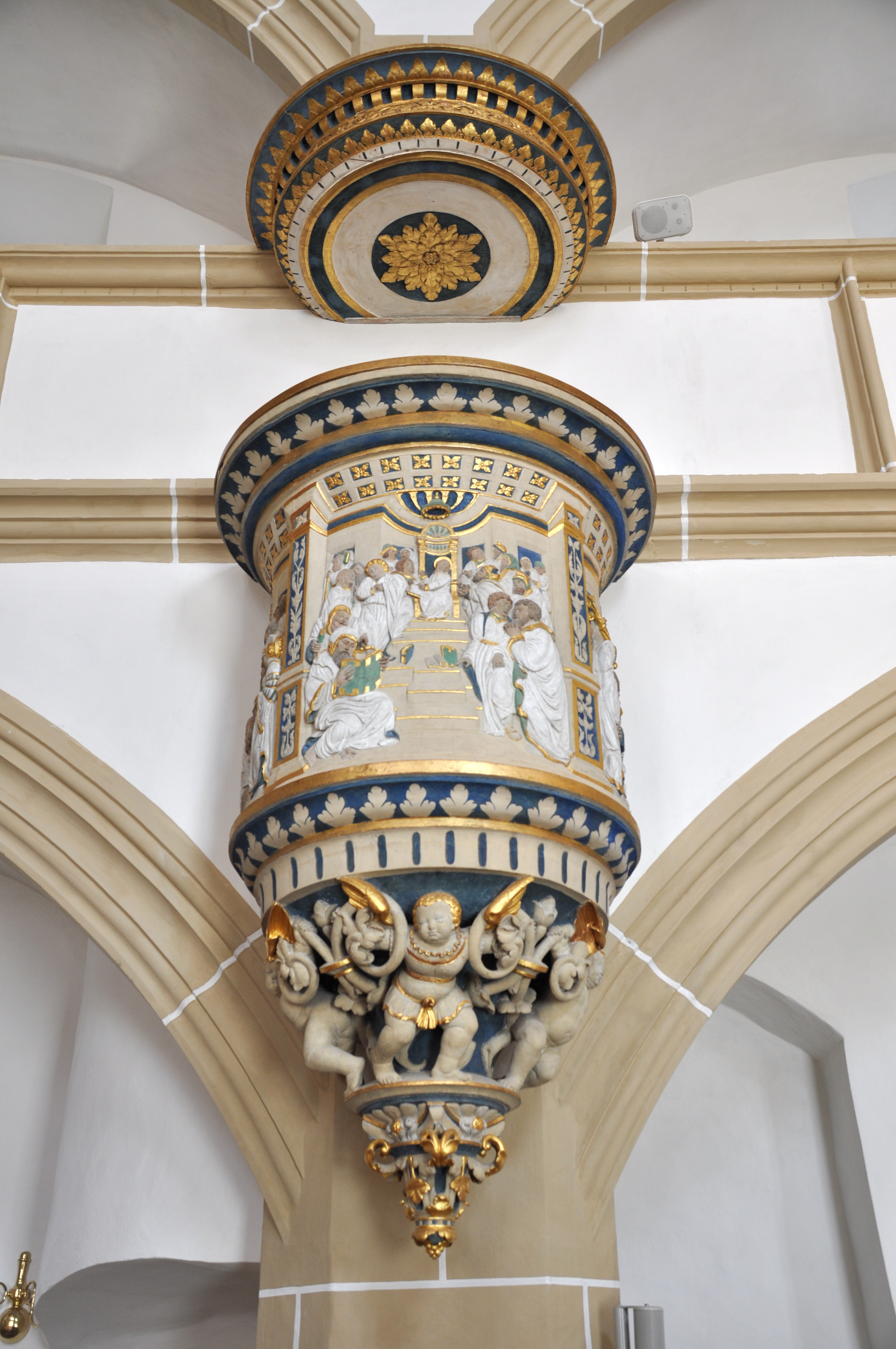 Torgau, Schloss Hartenfels, Schlosskirche, Kanzel von Simon Schröter, 1544